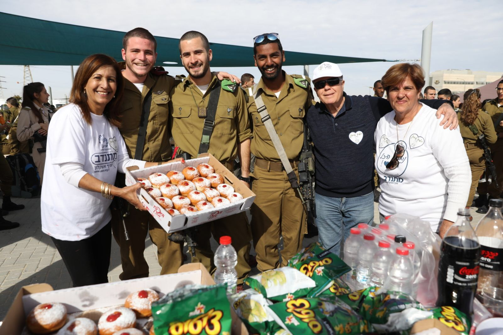 מתנדבי יחד למען החייל